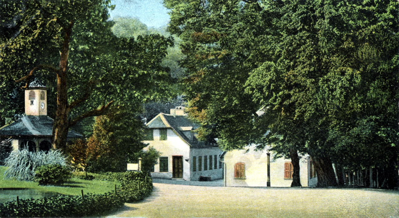 Das Fürstenlager in Bensheim-Auerbach auf einer Postkarte aus dem Jahr 1906